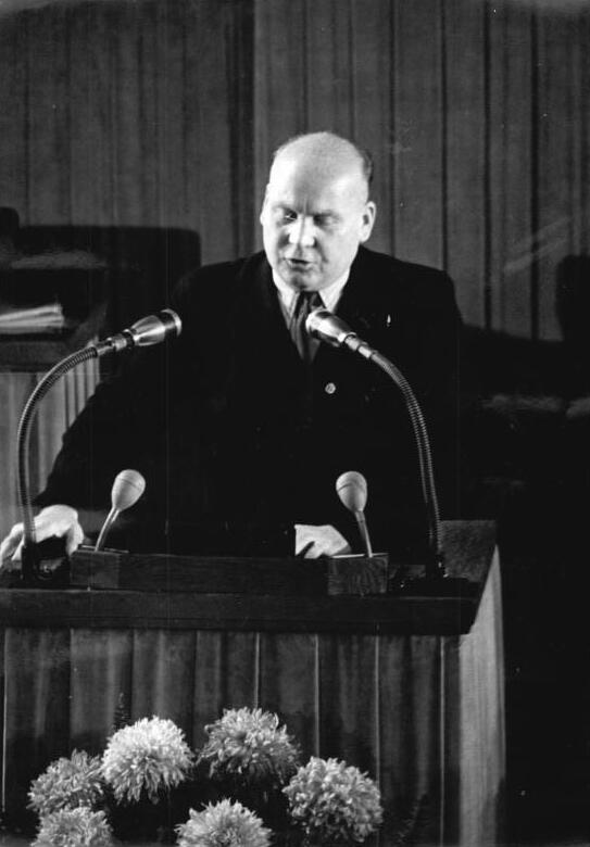 Illus/Quaschinsky 1.11.51 13. und 14. Sitzung der Volkskammer Die Volkskammer der DDR trat am 31.10.51 und 1.11.51 zu ihrer 13. und 14. Sitzung zusammen, um u.a. über das "Gesetz über den Fünfjahresplan zur Entwicklung der Volkswirtschaft der Deutschen Demokratischen Republik", den Rechenschaftsbericht der Regierung über die Einnahmen der Republik und ihre Verwendung für das Rechnungsjahr 1950" und das "Gesetz über die Deutsche Notenbank" zu beraten. UBz: Für die Deutsche Bauernpartei sprach Abgeordneter Weißhaupt.